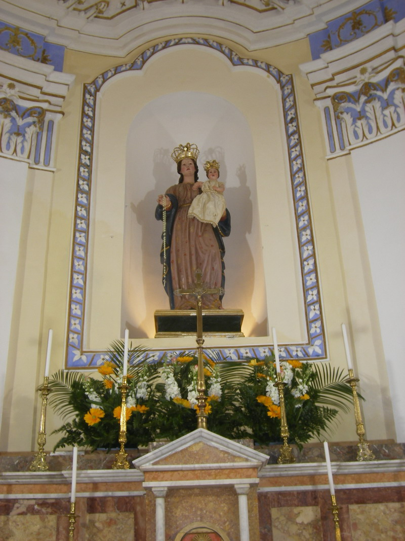 Madonna del Rosario, foto scattata personalmente in data 06/02/2007. M.Iannizzotto